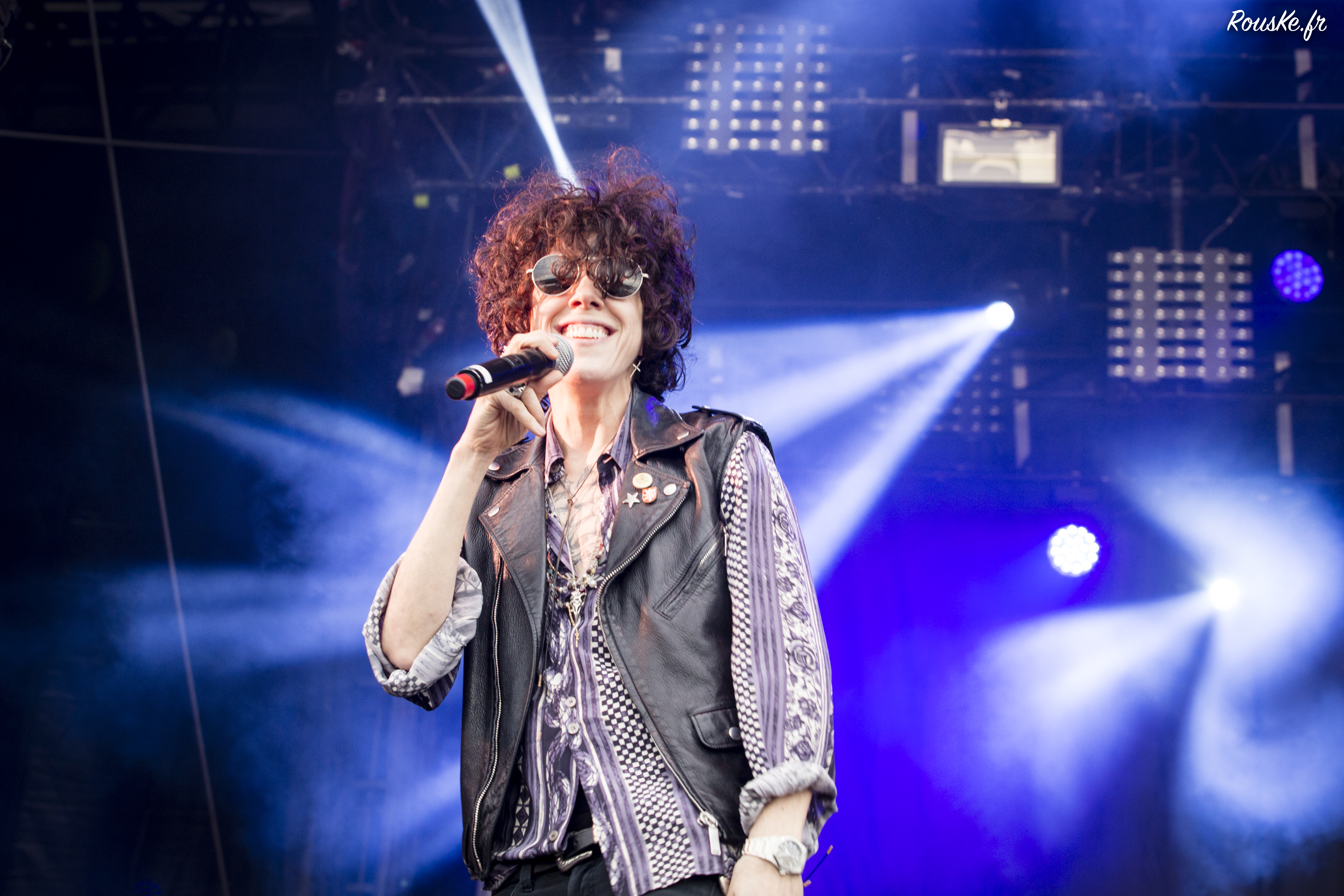 Laura Pergolizzi au Lollapalooza, juillet 2017, Paris